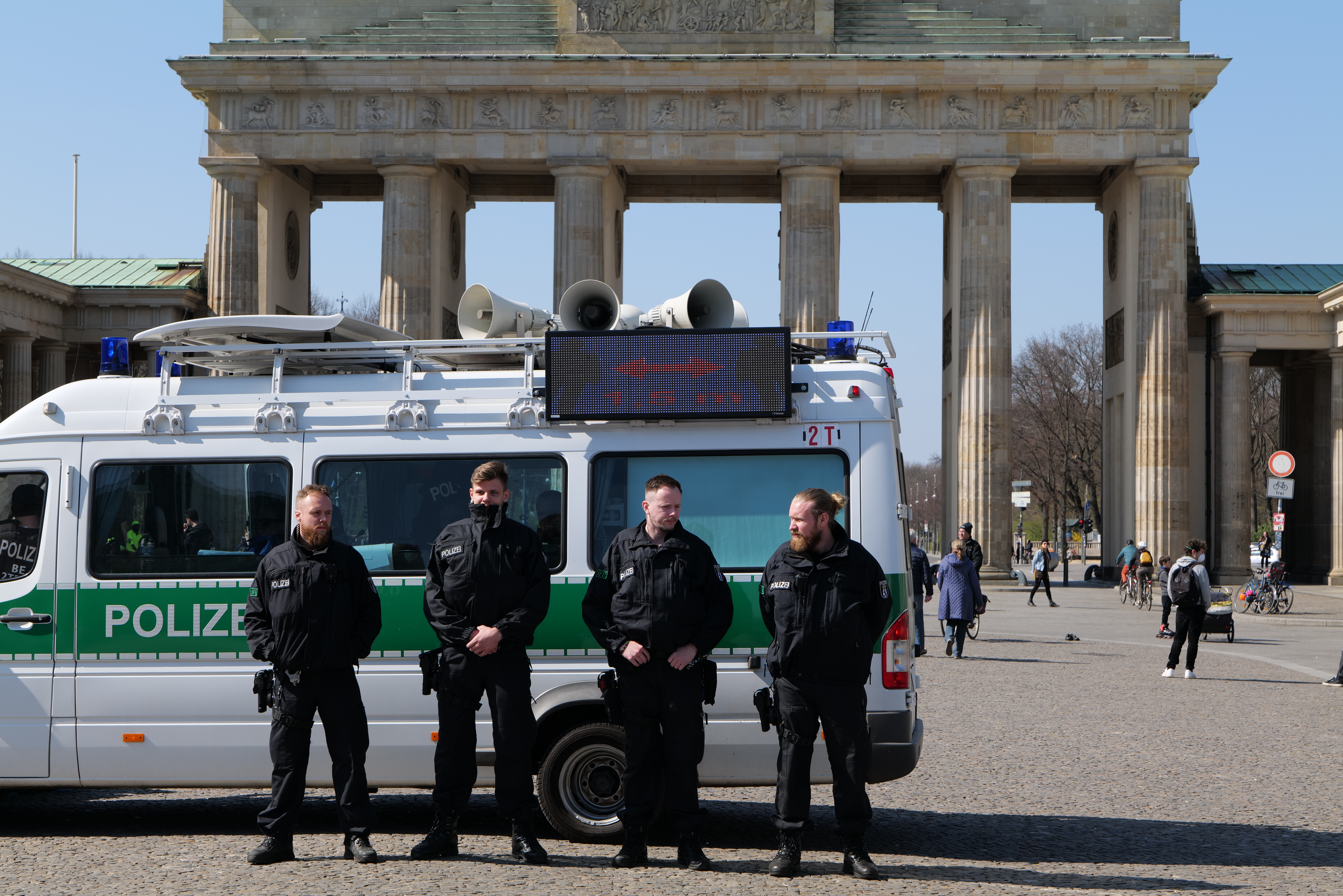 Protest für die Evakuierung der Geflüchteten aus den Lager auf den Griechischen Inseln am Brandenburger Tor in Berlin am 5. April 2020.